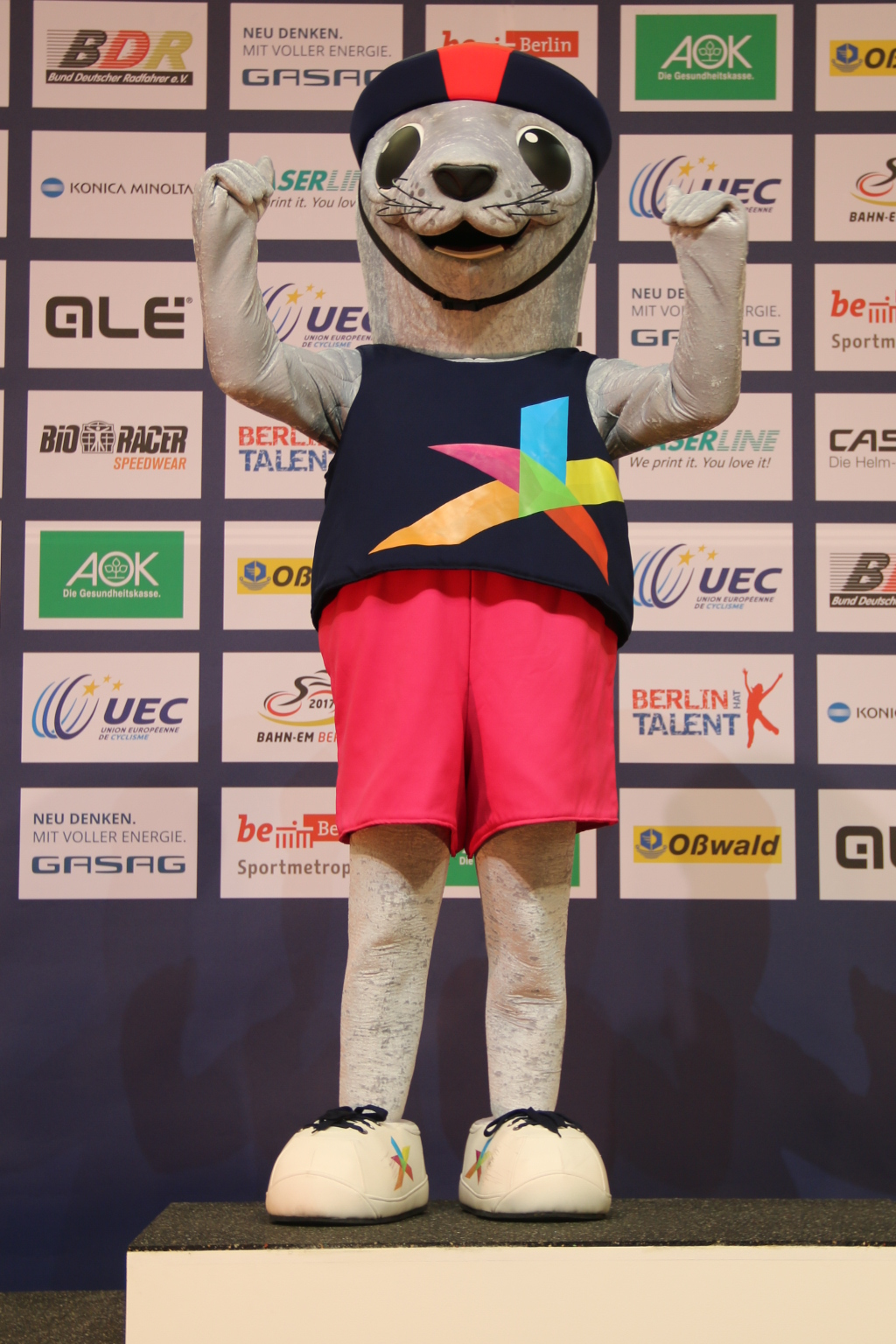 Seehund "Bonnie", Maskottchen der UEC-Bahn-Europameisterschaften 2018 in Glasgow, bei seiner Vorstellung in Berlin